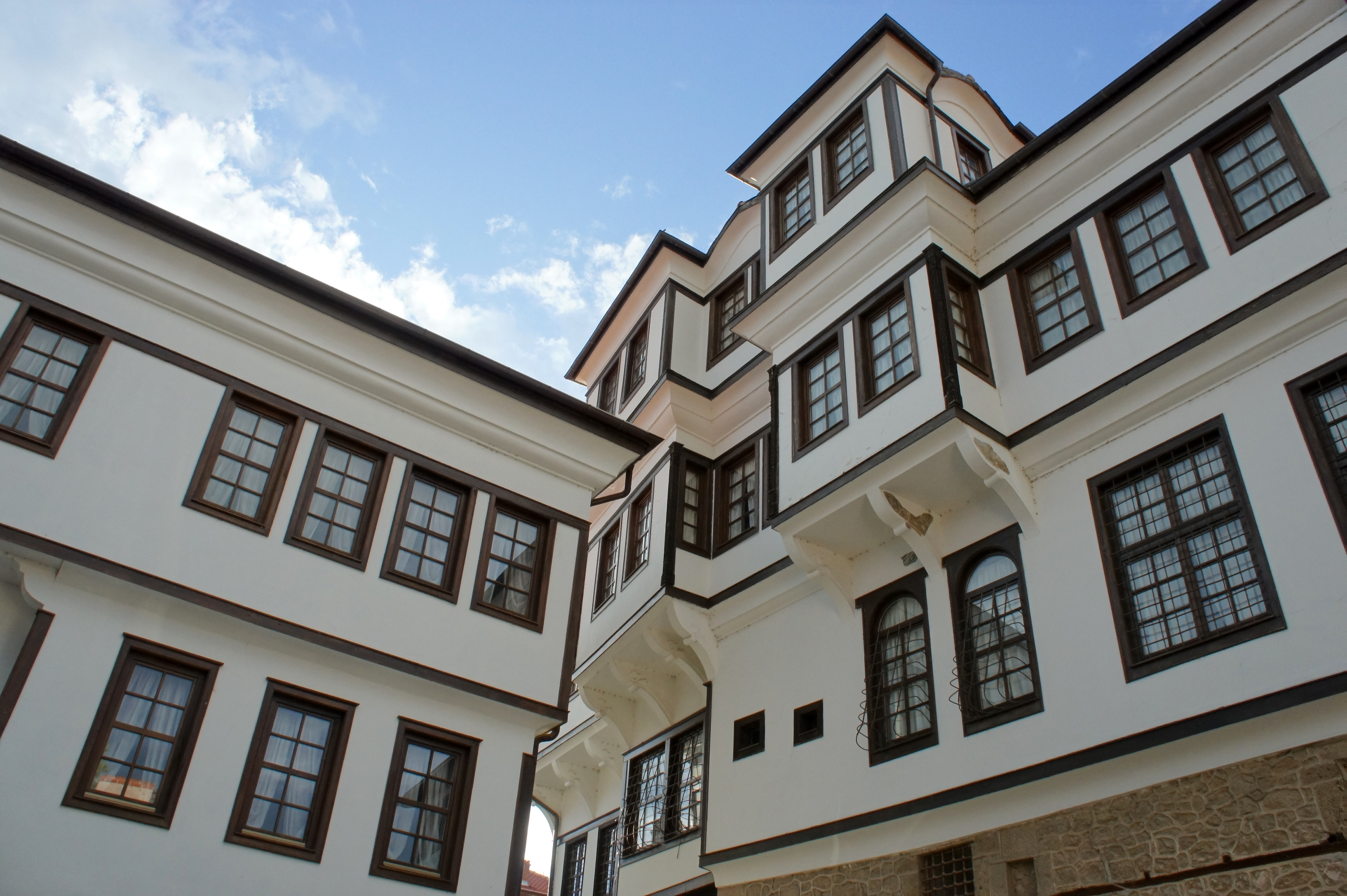 Една од најпознатите и најрепрезентативни куќи во Охрид е куќата на браќата Робевци. Братската куќа е изградена од галичкиот мајстор Тодор Петров кон средината на 19 век, и се протега на четири нивоа. Последното ниво, покрај белведерето има и посебни простории за момите, наречени „девојачки одаи“. Одаите во горните катови се прошируваат со што се добива раздвижена и интересна фасада. Покрај принципите на македонската народна архитектура, оваа куќа има присвоено и западни карактеристики.